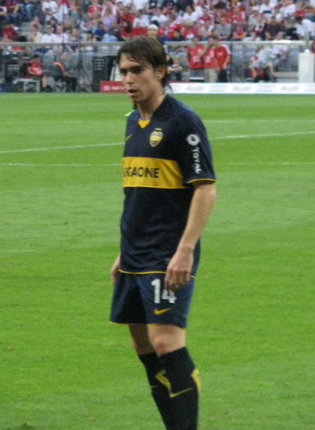 argentinischer Fußballspieler: Boca Juniors und ehem. U20-Nationalteam